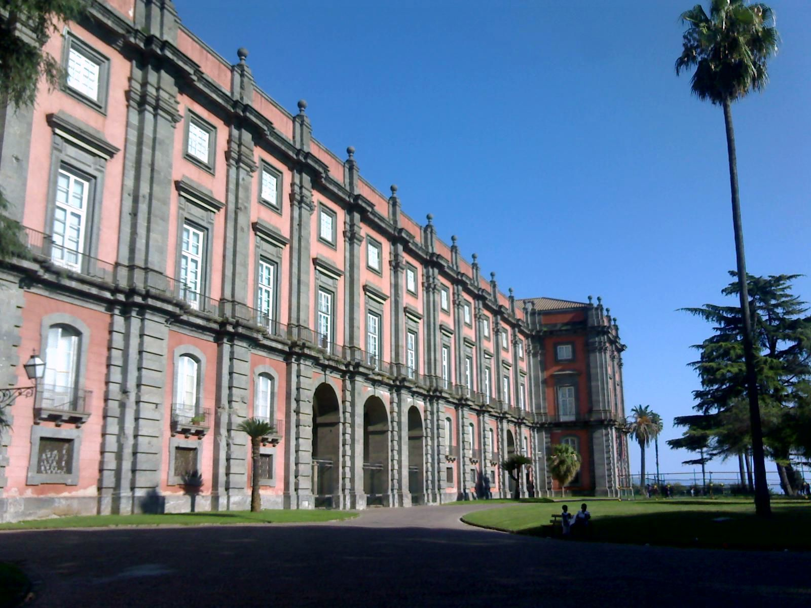 Facciata posteriore della Reggia di Capodimonte (Napoli)